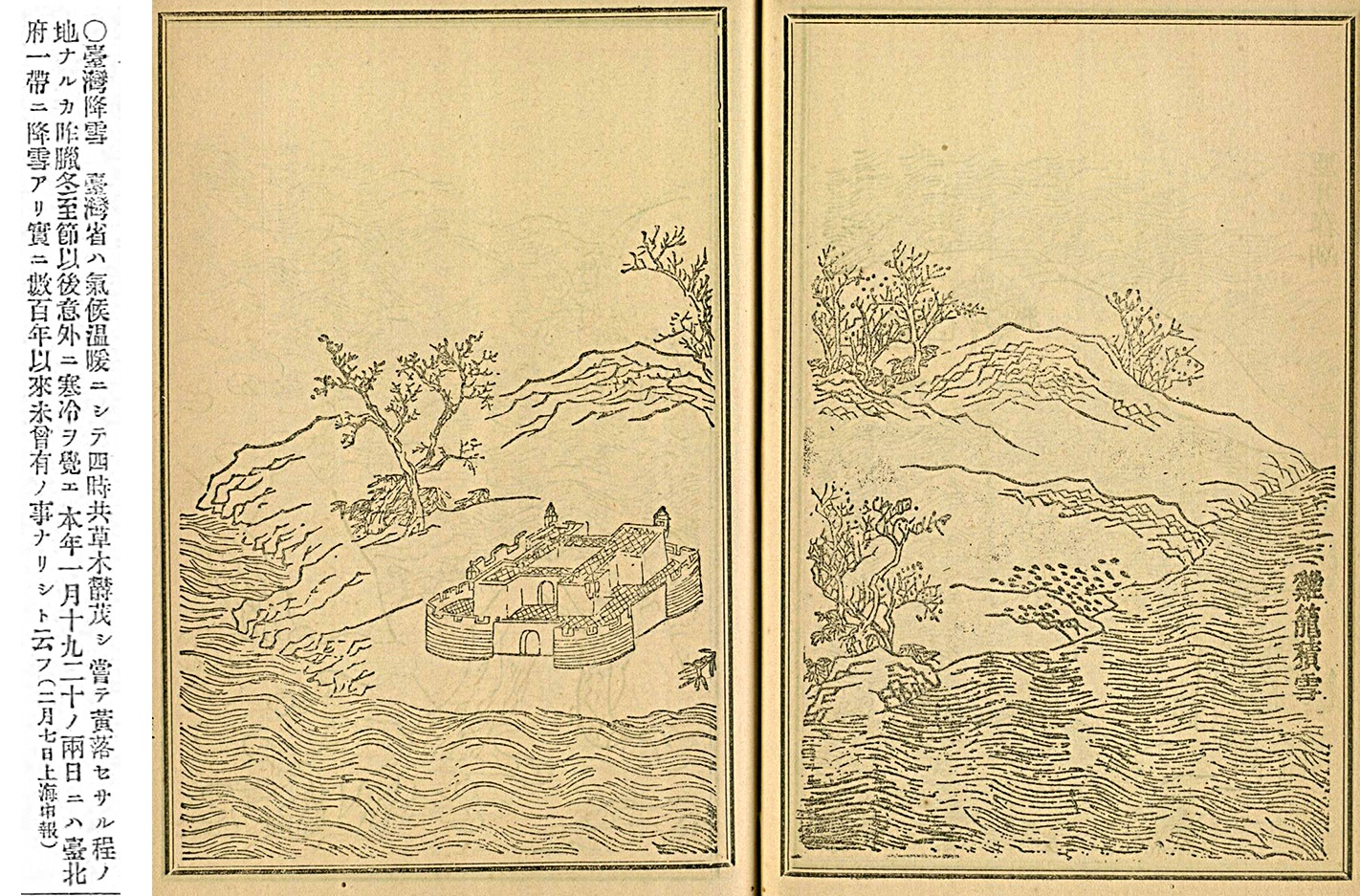 圖左：刊載於上海申報的臺北府下雪新聞，被收錄於同年日本官報 圖右：清國時期 臺灣郡治八景圖 雞籠積雪